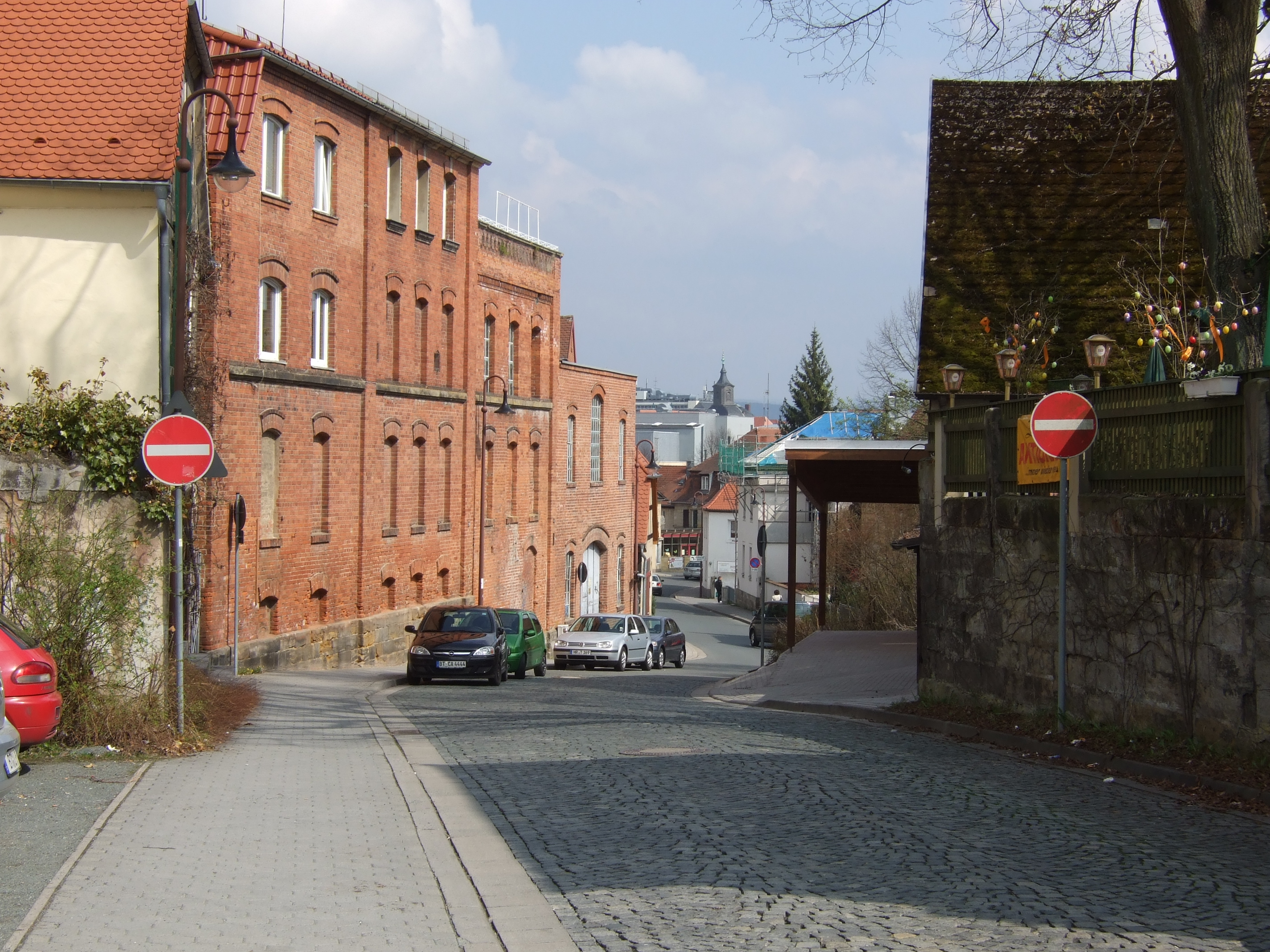 Untere Straße Kreuz mit altem Brauereigebäude